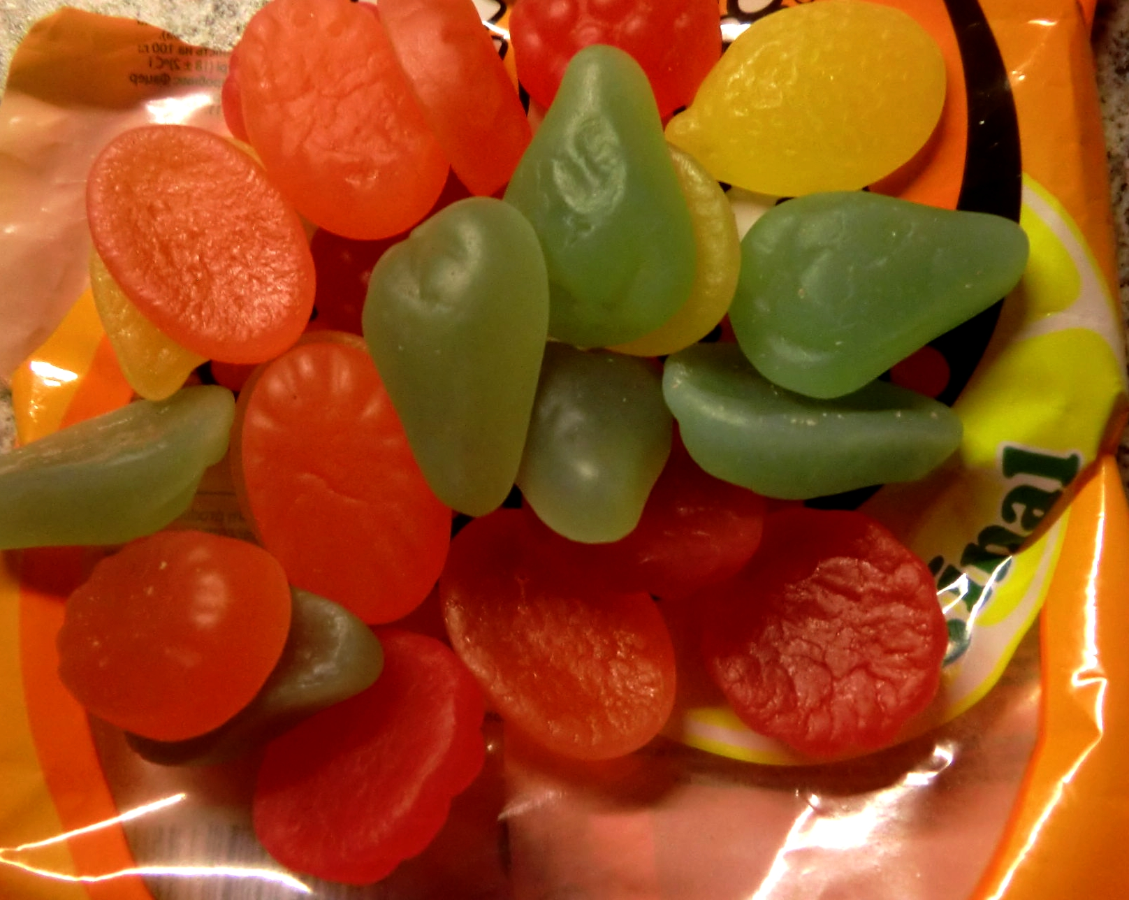 Tutti Frutti i påse, som introducerades 1989, lätt att känna igen på färgerna.